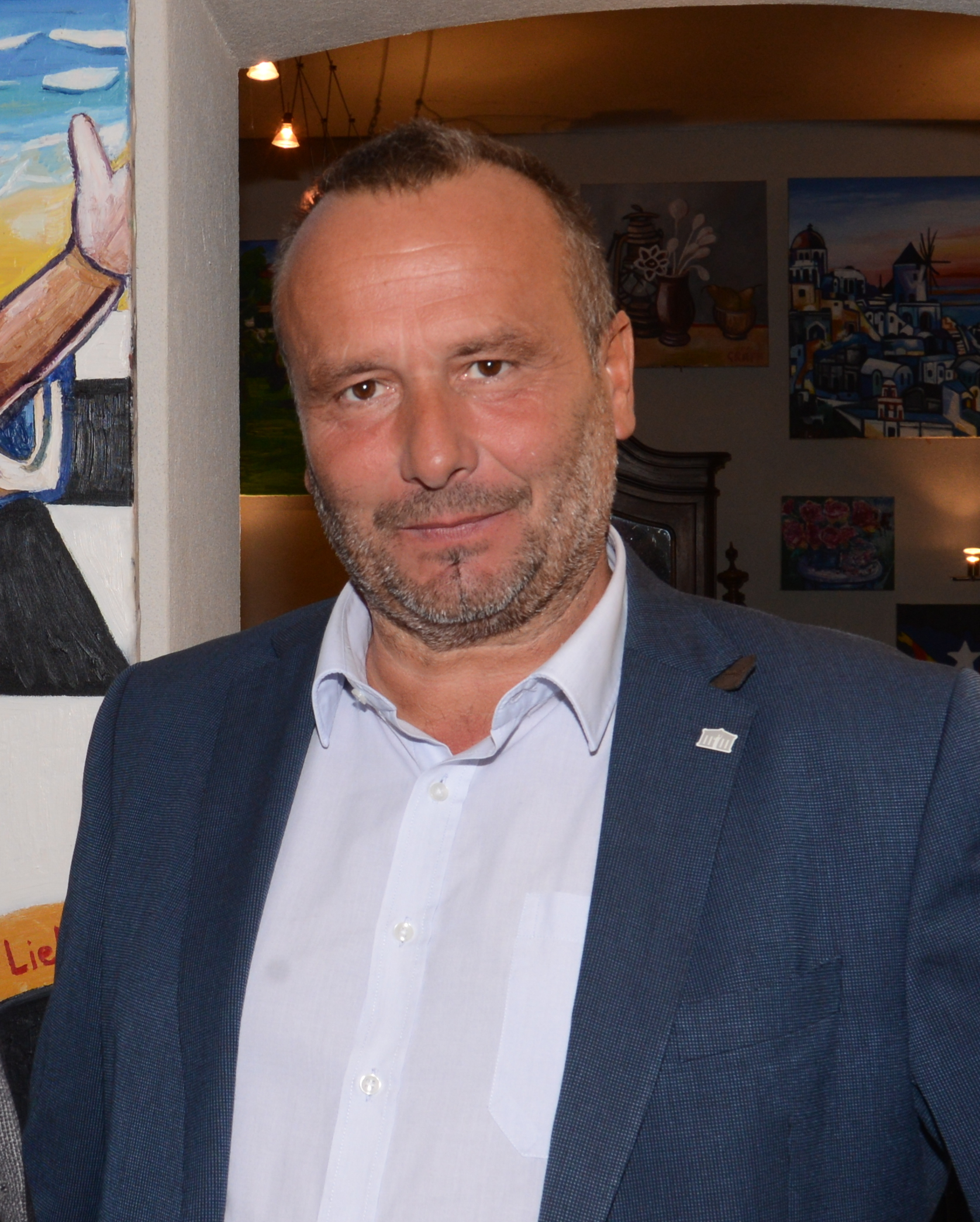 "Dialog im Kamptal - Politik näher bringen", veranstaltet durch Georgia Kazantzidu und Matthias Laurenz Gräff im Atelier Gräff in Zitternberg, Gars am Kamp, 10. 9. 2019 Vortragende Diskutanten: Herbert Kolinsky (NEOS), Dir. Günter Steindl (SPÖ), NR Martina Diesner-Wais (ÖVP), Martin Litschauer (Die Grünen), Ehrengast Werner Gruber (SPÖ) Moderation durch LAbg. Josef Wiesinger (SPÖ), Mitglied des Bundesparteivorstandes, Stellvertretender Landesparteivorsitzender Personen am Foto: Klemens Kofler und Alois Kainz